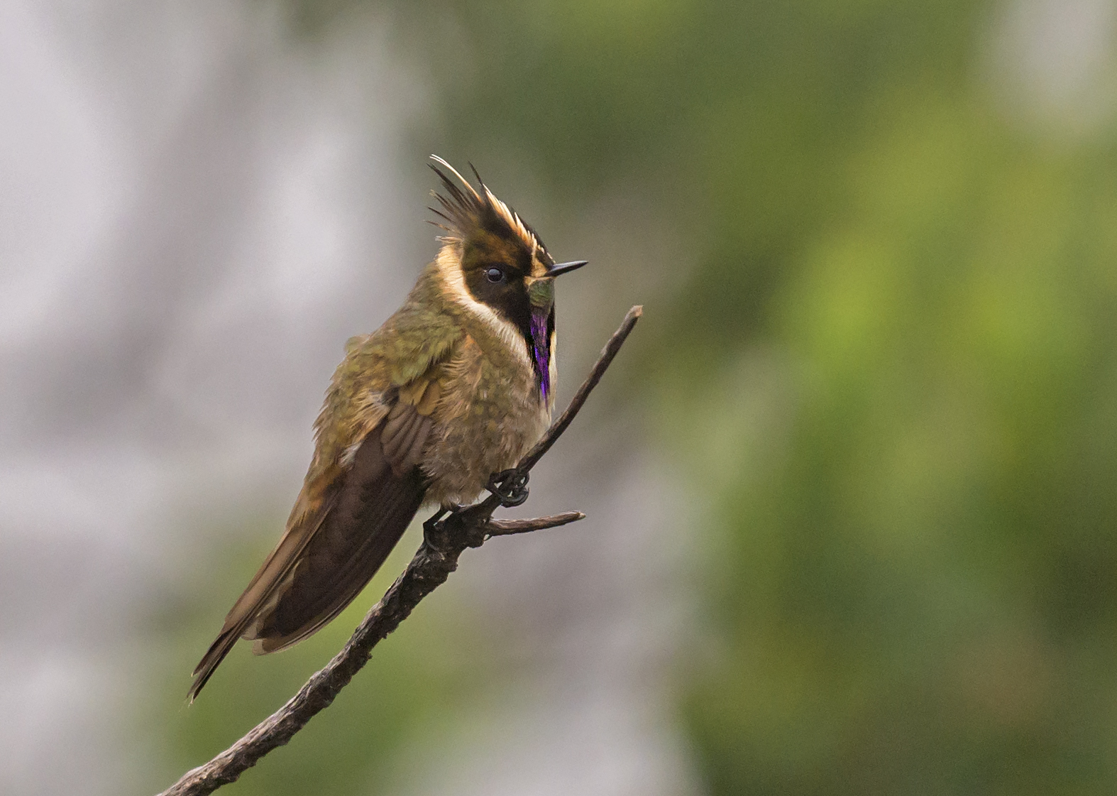 Buffy helmetcrest, Oxypogon stuebelii En "Brisas" - Nevado del Ruiz. Manizales.